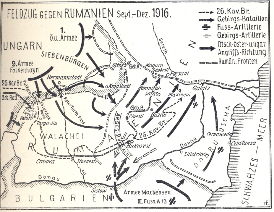 Karte Seite 61: Feldzug gegen Rumänien September - Dezember 1916